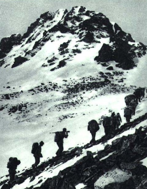 1967-10 红军时期夹金山